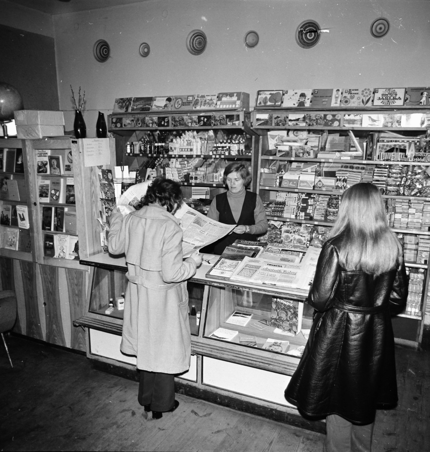 Lubrza. Wnętrze Klubu Prasy i Książki "Ruch".